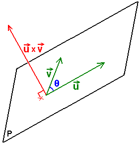 Figura realizada por M.Romero Schmidtke, especialmente para le Enciclopedia Libre y Wikipedia.